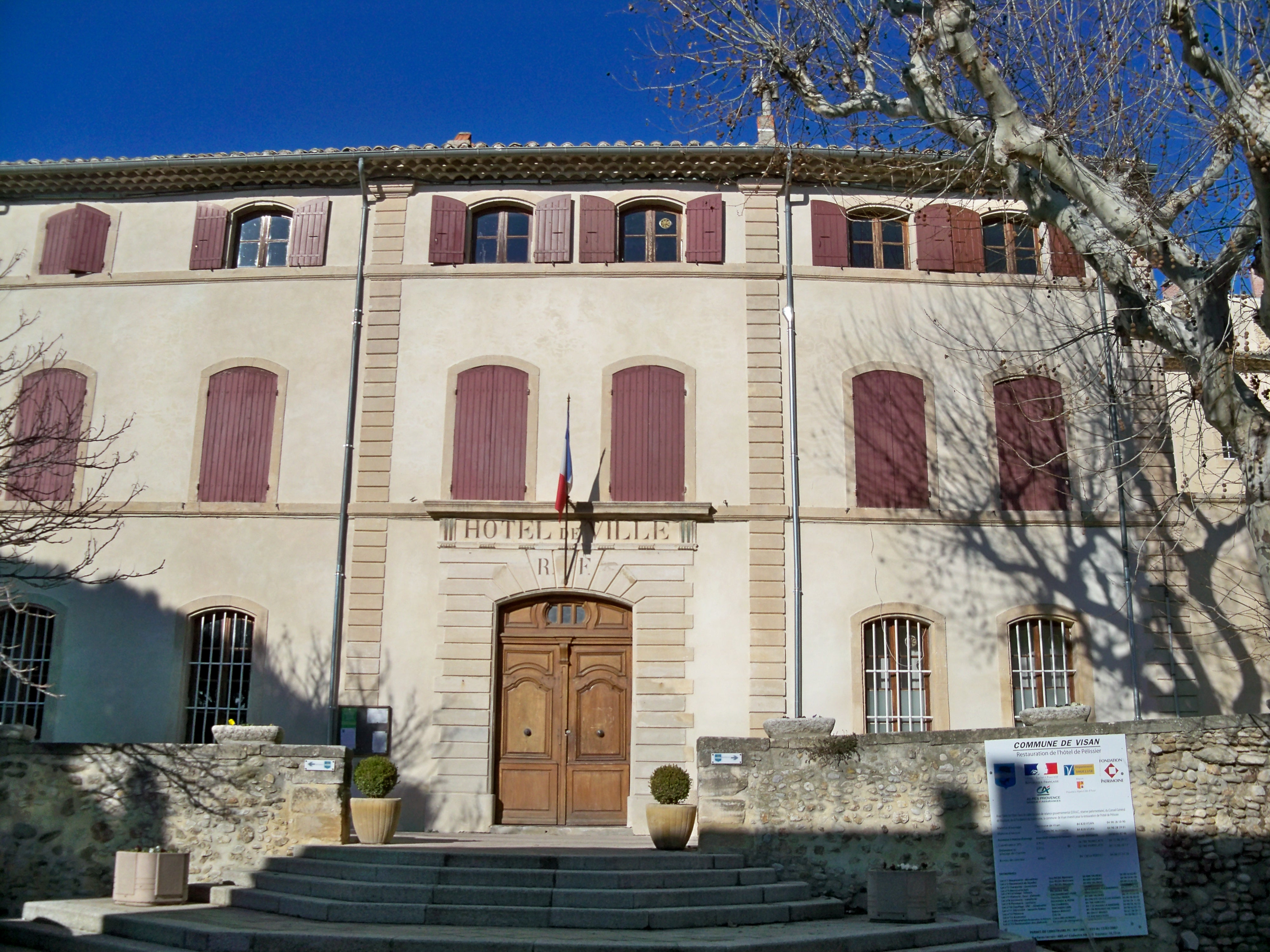 Mairie de Visan (Vaucluse, France)